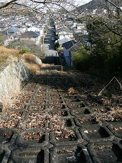 酒鬼薔薇聖斗チョコレート階段